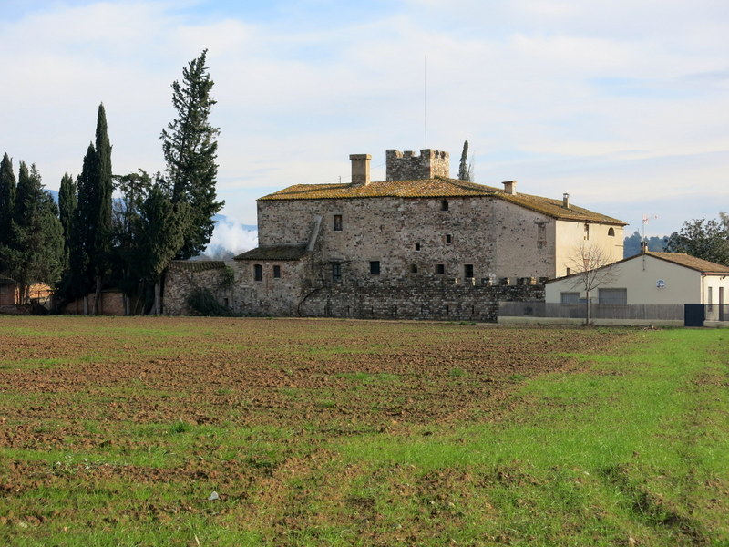 Casal Rosanes a La Garriga - Catalunya